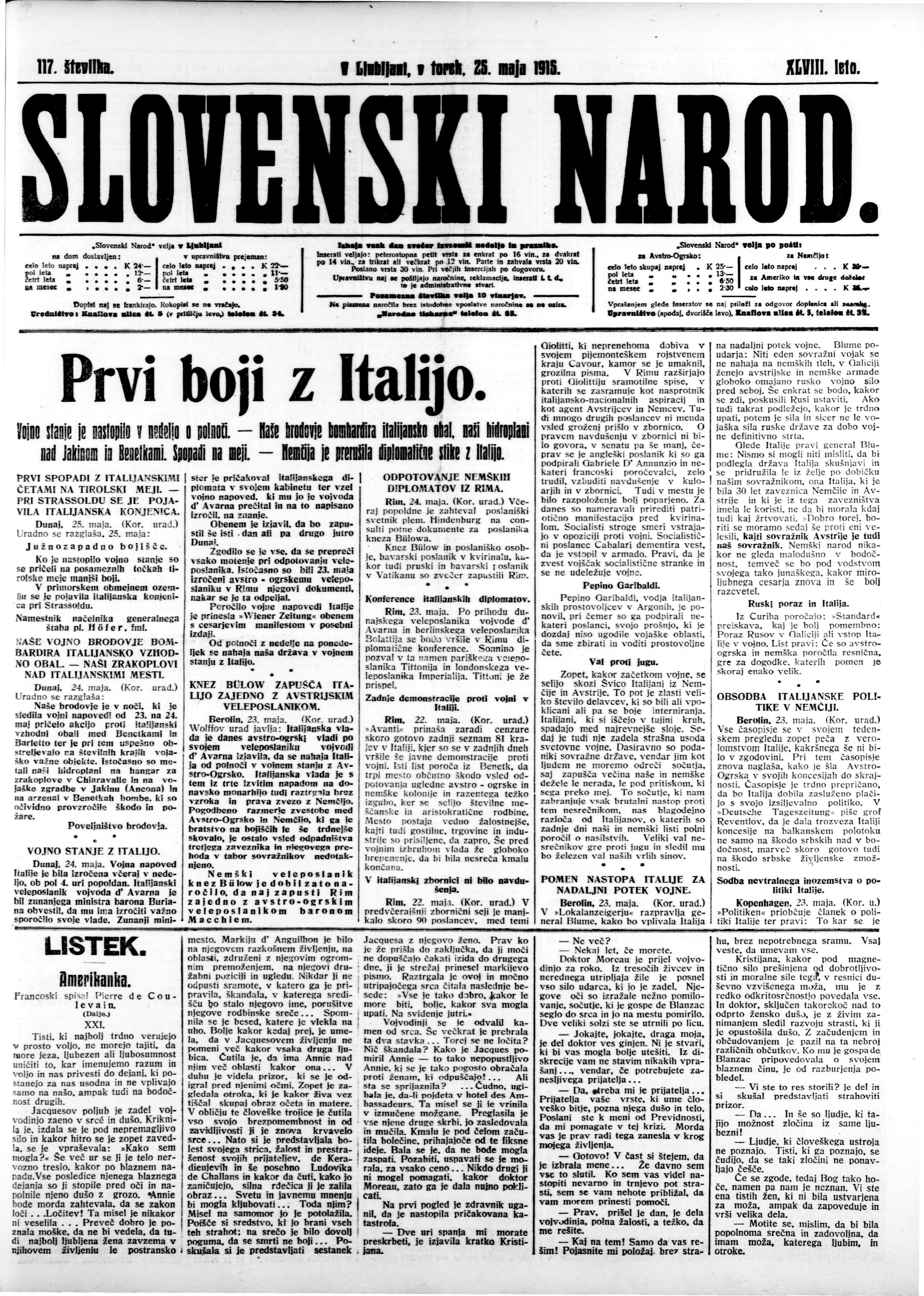 Prva stran častnika Slovenski narod iz dne 25. maj 1915, ki bralcem sporoča, da so se med Italijo in Avstro-Ogersko začeli prvi boji.